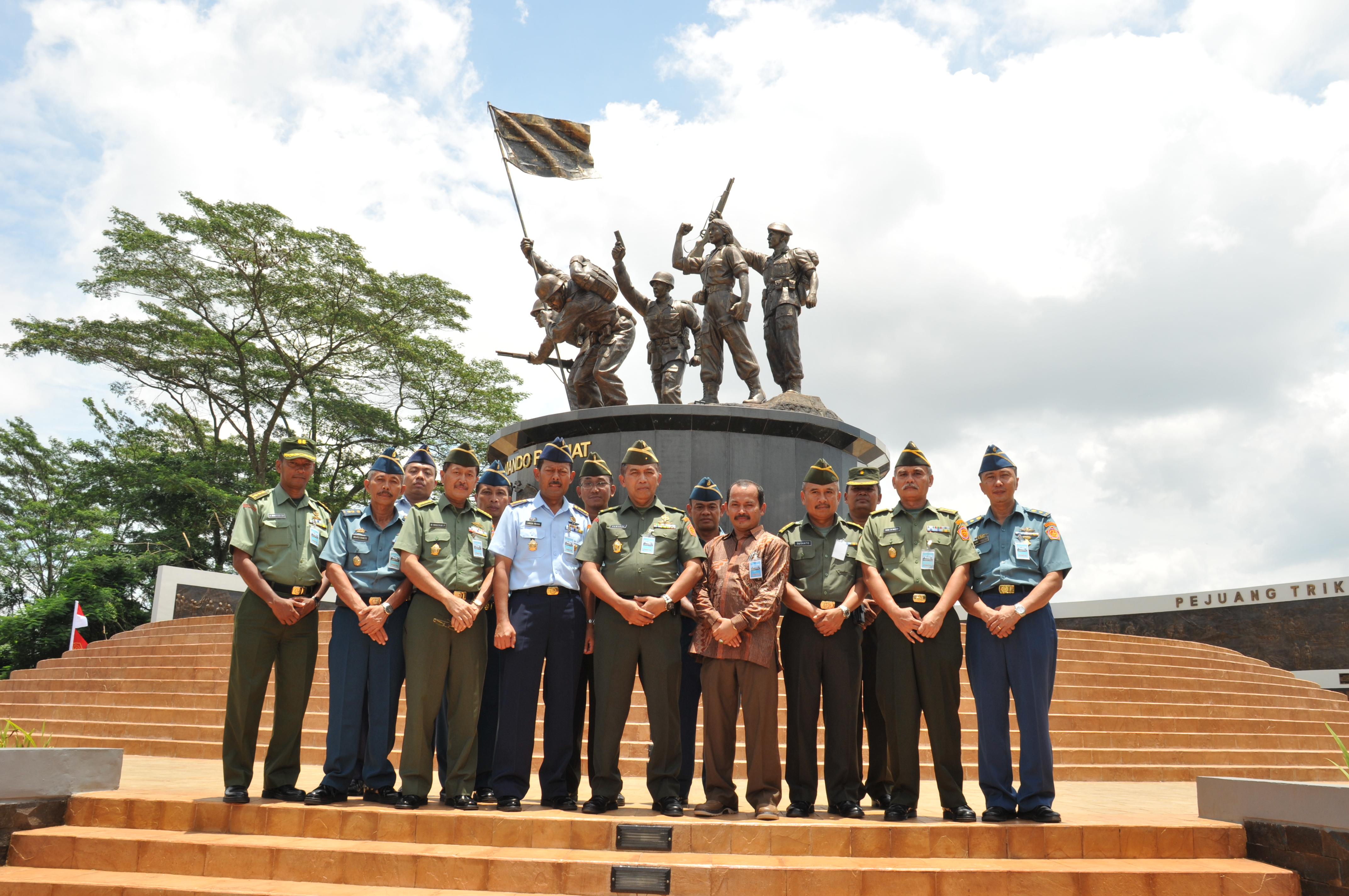 Yusman dan Kapusjarah TNI dalam acara Peresmian Monumen Dwikora dan Trikora Mabes TNI Cilangkap oleh Presiden RI Susilo Bambang Yudhoyono